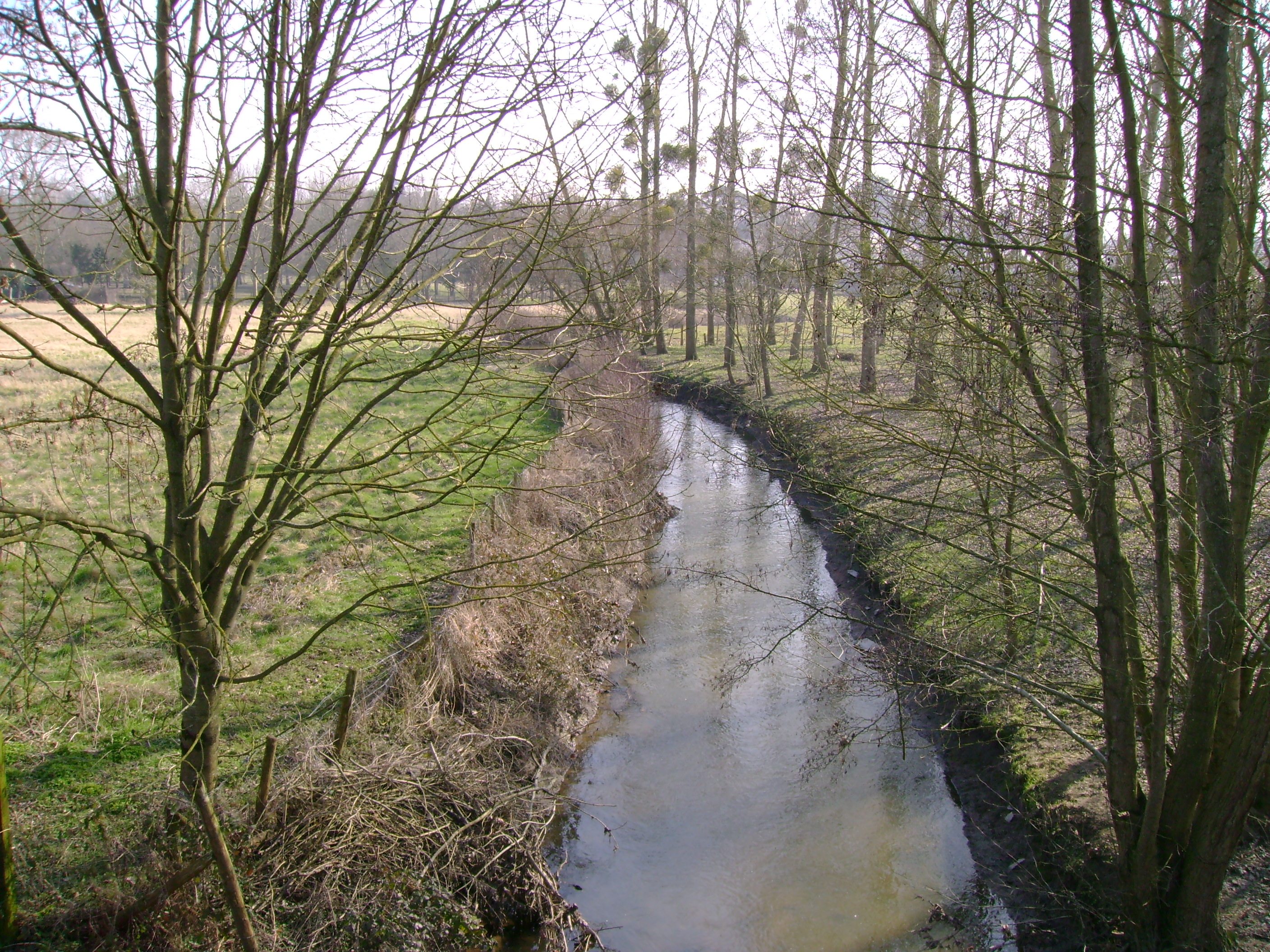 La vallée de l'Erdre, Candé, 49, France